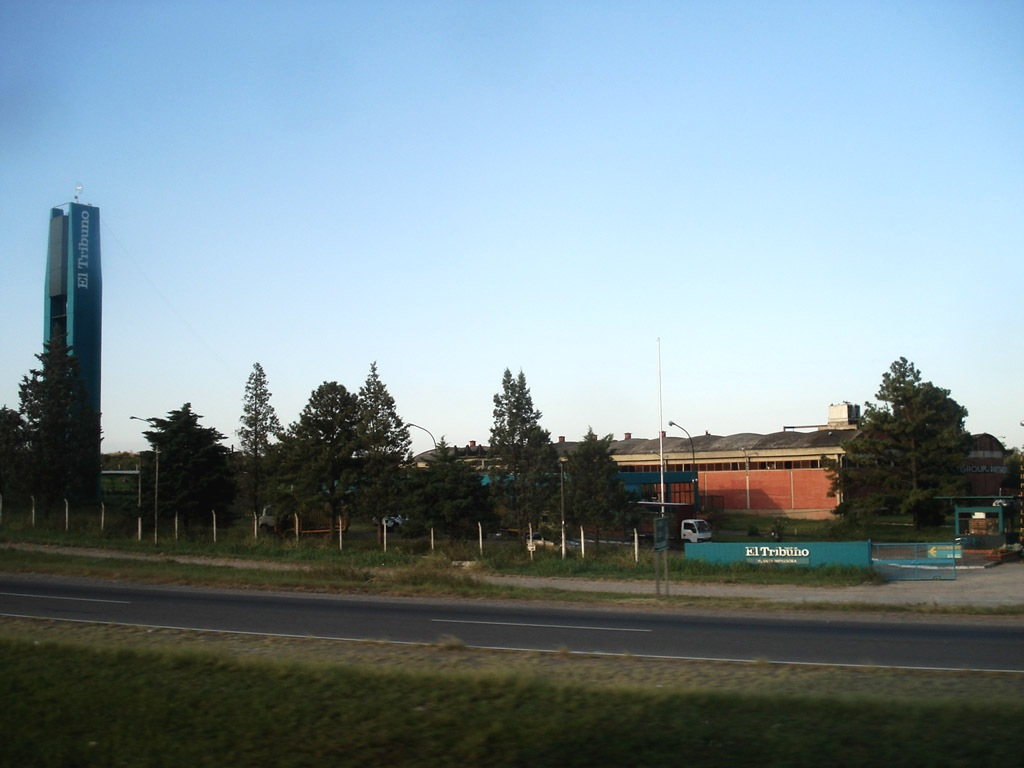 Planta impresora del diario El Tribuno de Tucumán, Departamento Tafí Viejo.